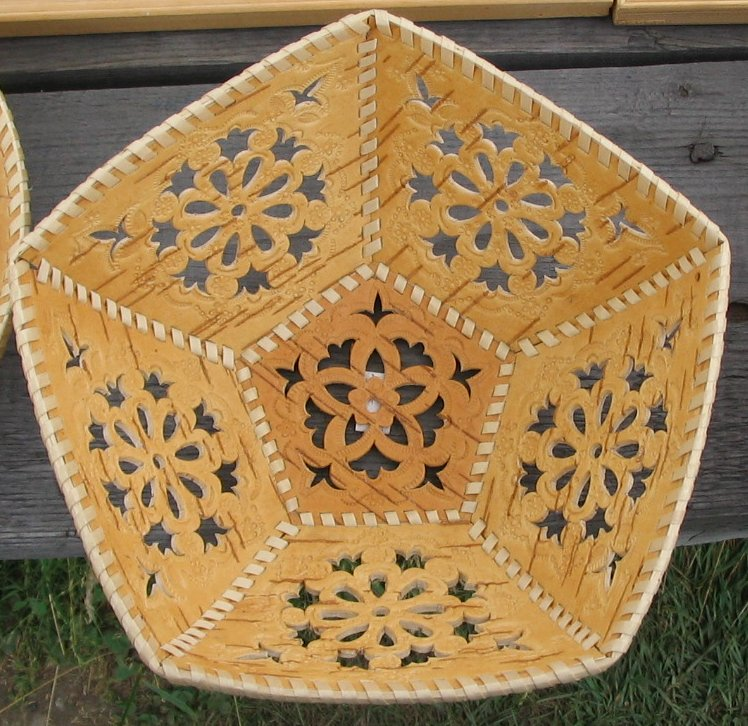 Eine Schale aus Birkenleder, durchbrochen und geprägt. Selbsfotografiert Autor: Aineias